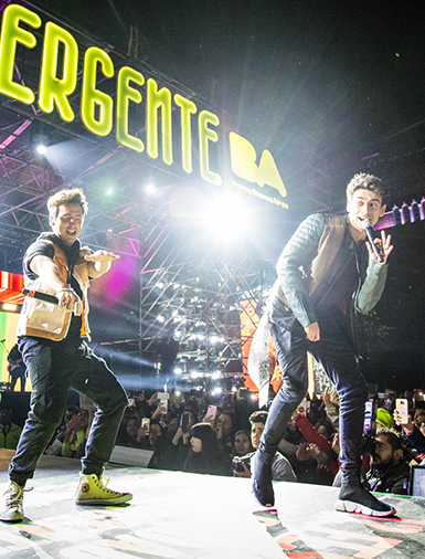 MYA (Maxi Espíndola y Agustín Bernasconi) y Agustín Casanova en la apertura del Festival Ciudad Emergente en 2019.